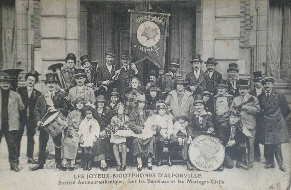 Les Joyeux Bigotphones d'Alfortville.